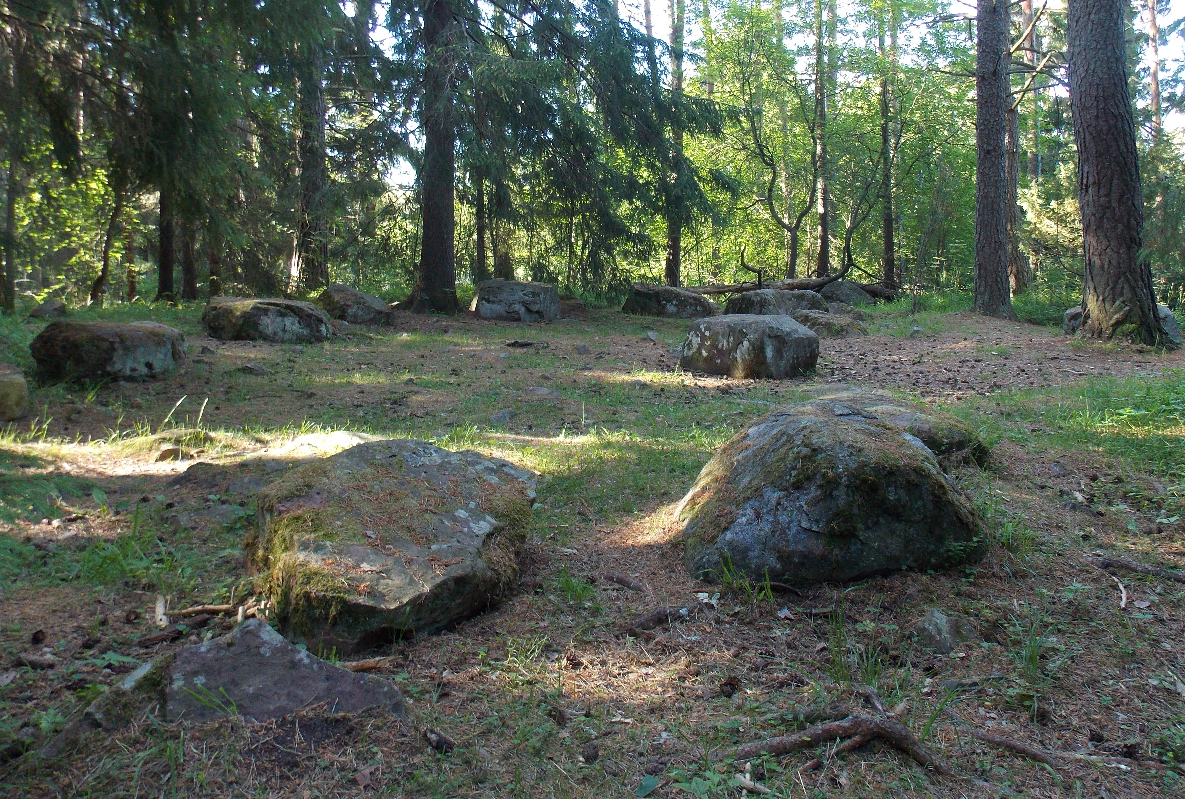 Liikistö; varhaiskeskiaikainen kauppapaikka, kirkonpaikka ja hautausmaa Ulvilassa Satakunnassa